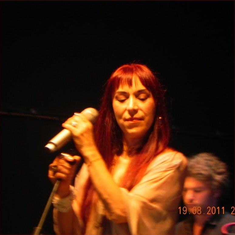 Leman Sam, Şevval Sam ve Şehnaz Sam'ın Kuruçeşme Arena'da verdiği aile konserinden görünüm. (20 Ağustos 2011)